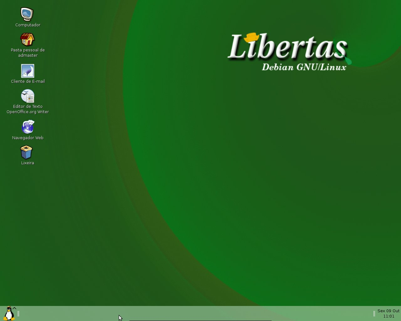 Tela principal da distribuição Libertas Debian GNU/Linux.